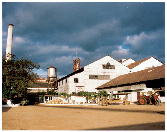 El antiguo Central Azucarero "Guipúzcua" perteneciente a la familia Arriandiaga Gurruchaga actualmente llamado "Esteban Hernández" localizado en las inmediaciones de Martí, provincia de Matanzas, Cuba